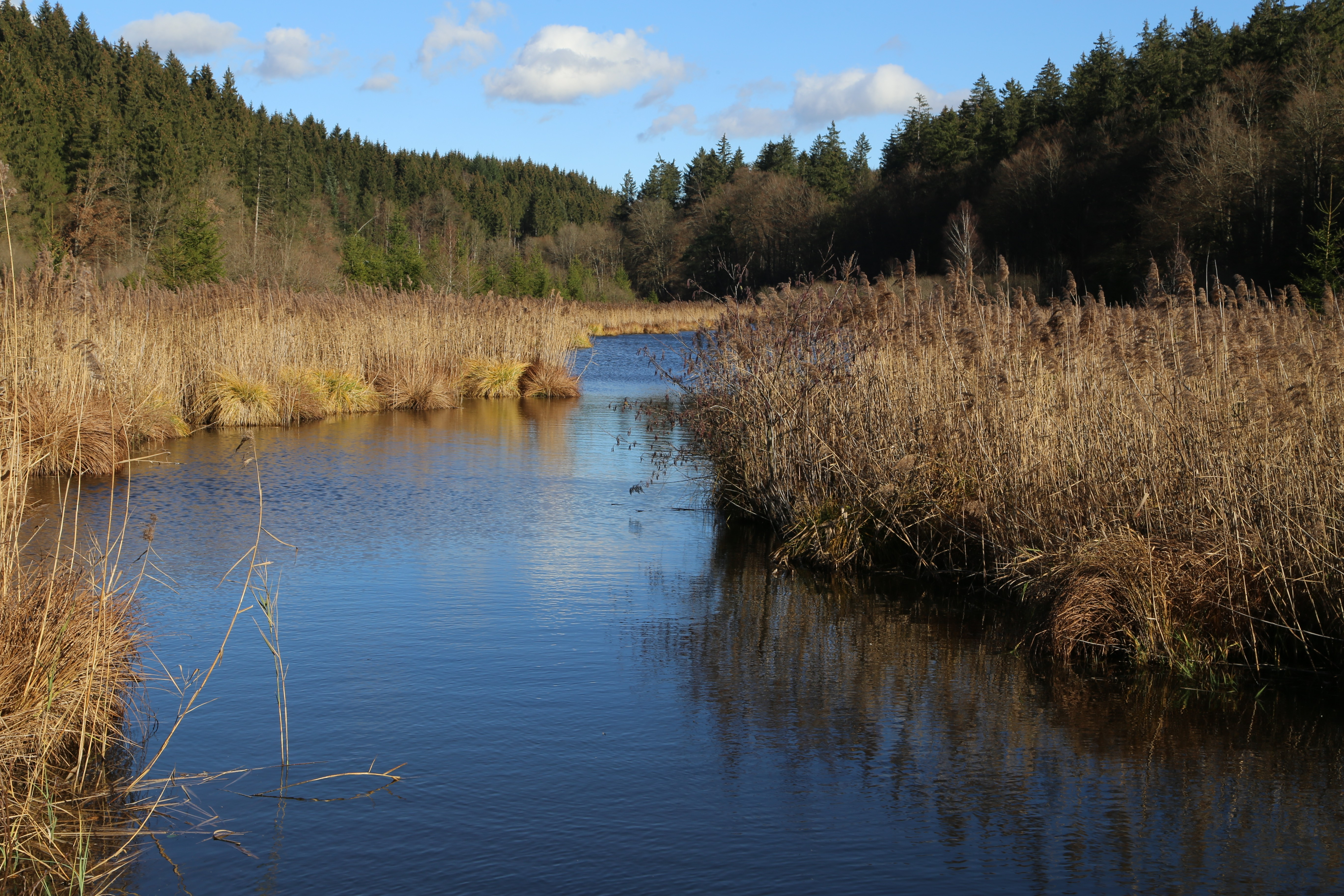 Deininger Weiher, Straßlach-Dingharting